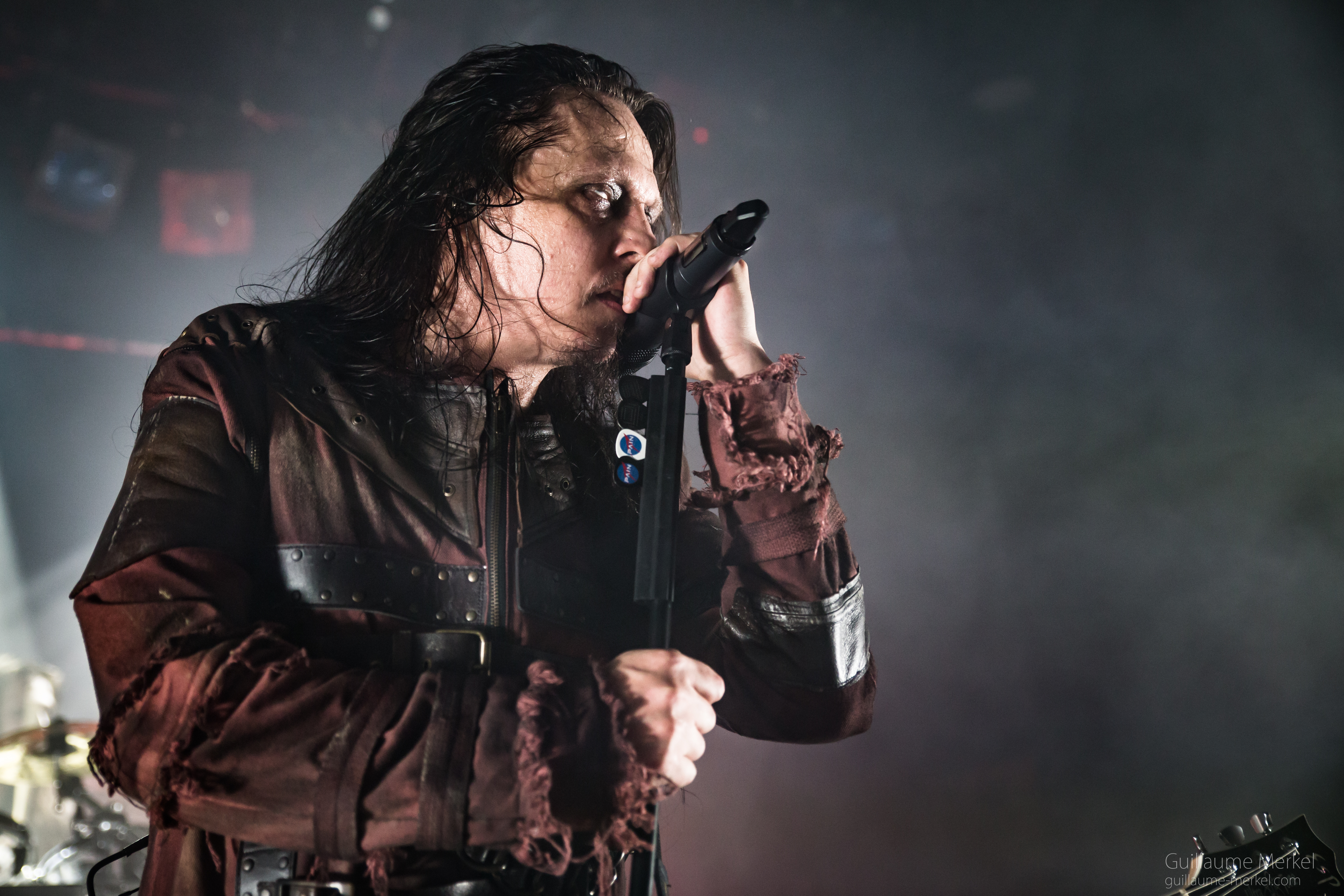 Pain in Selestat 2017